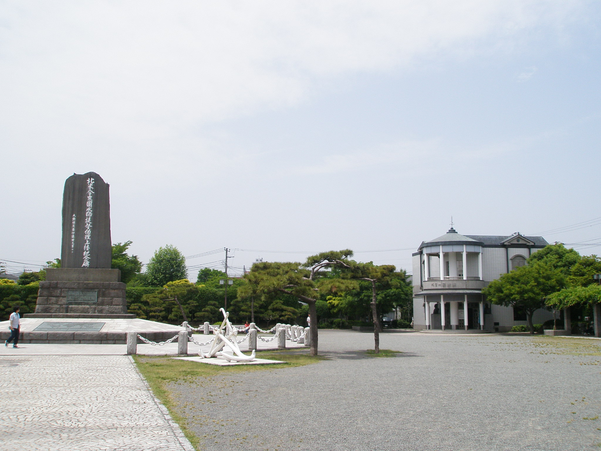 神奈川県横須賀市、ペリー公園